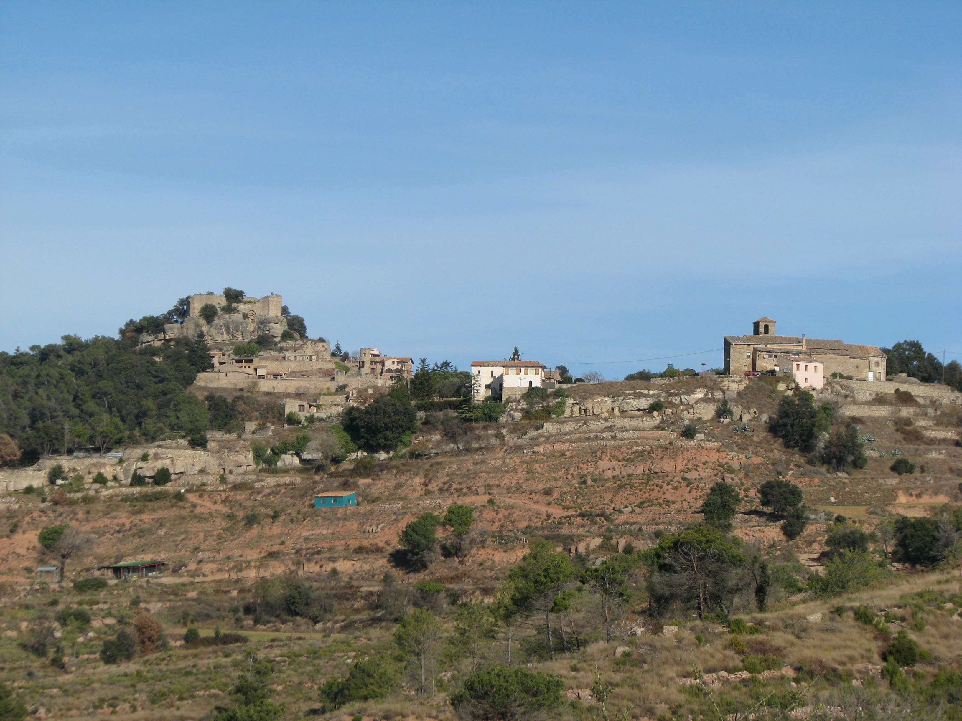 Vista general de Granera